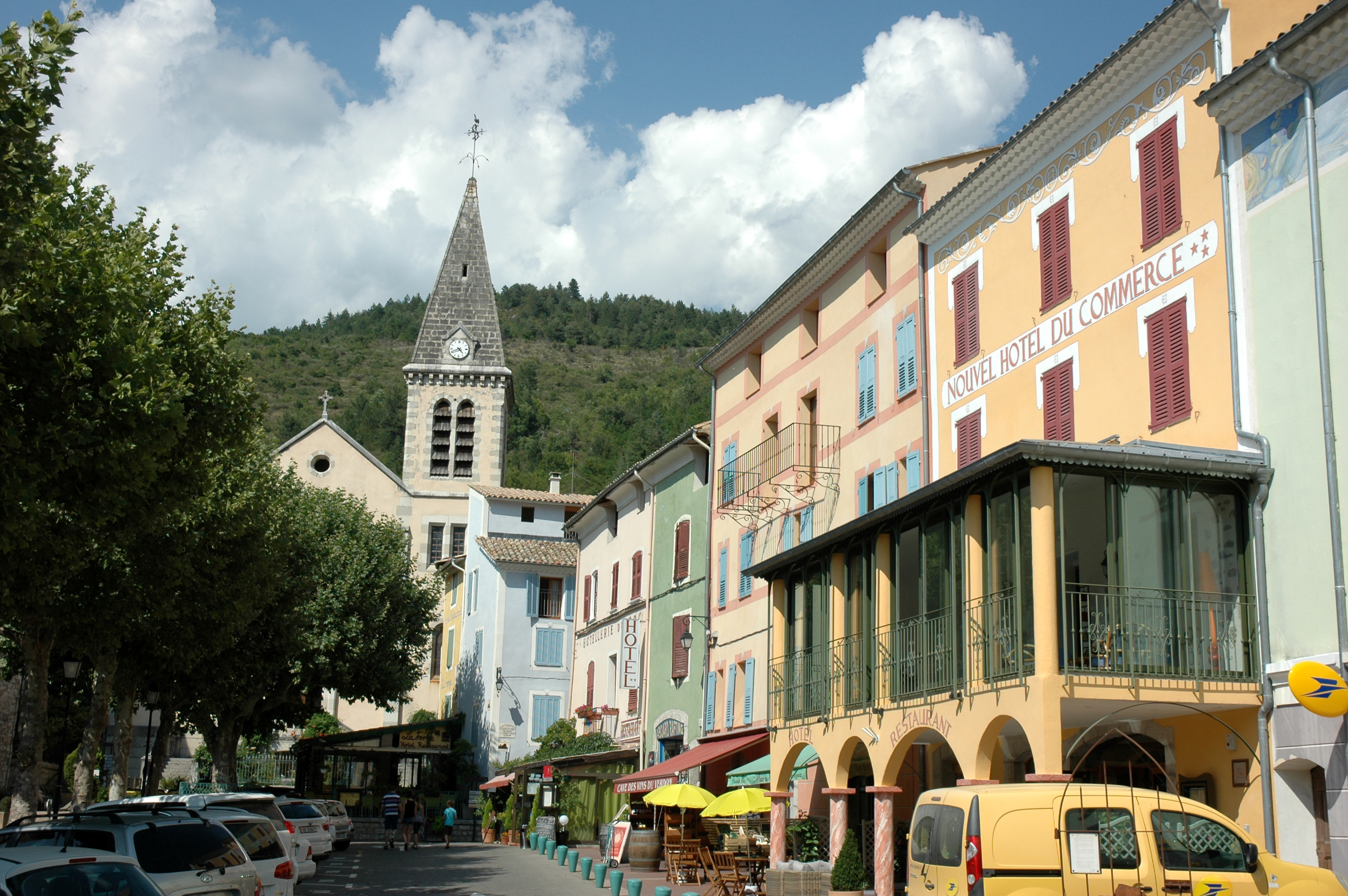 Église du Sacré-Cœur de Castellane